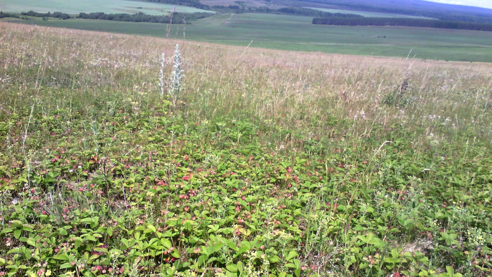 Клубника (Fragaria viridis), Россия, Челябинская область